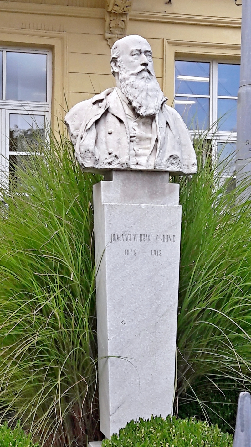 Brno, přestavba nádraží